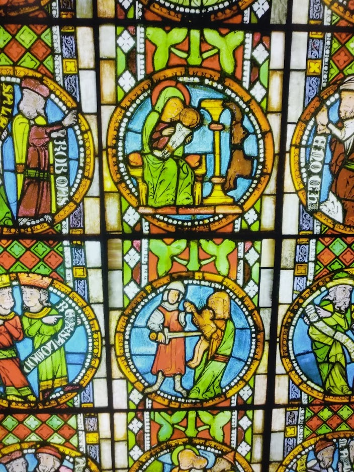 Muzeum Historii Włocławka (2019 r.)